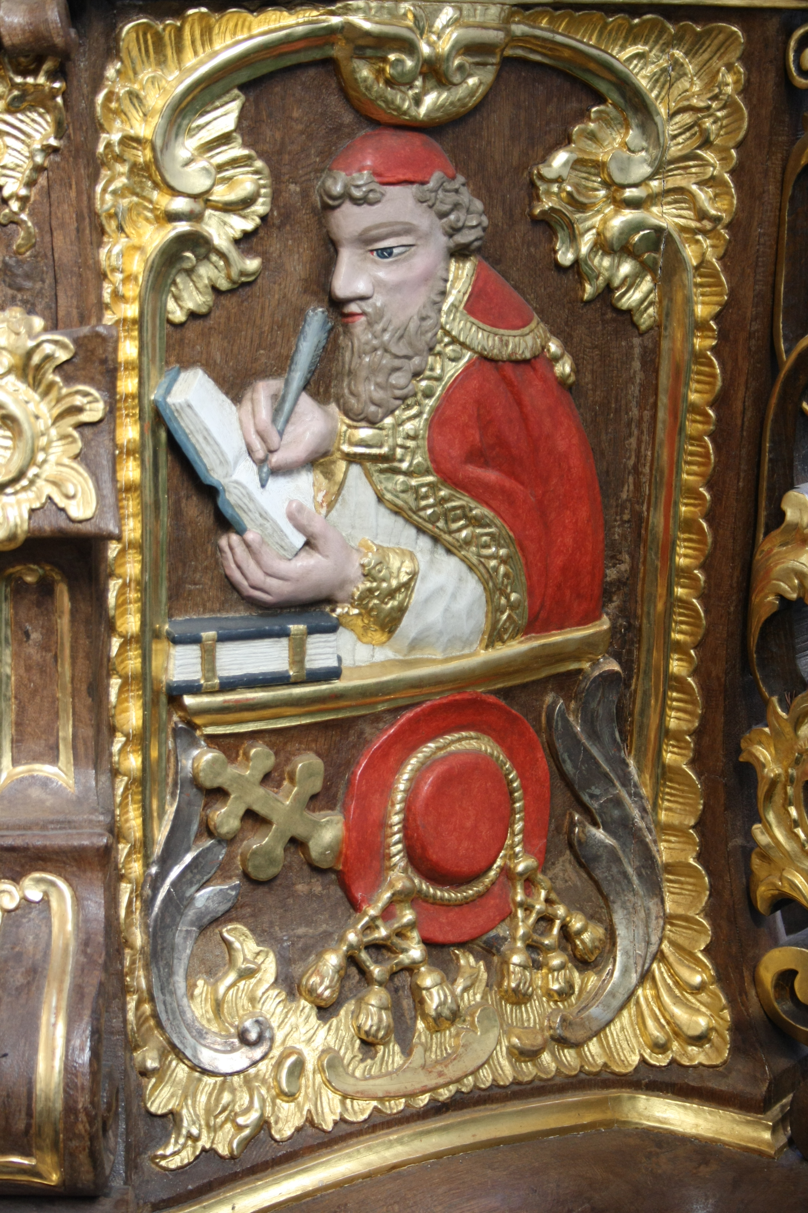 Pfarrkirche St. Maximin in Antweiler, Detail der Kanzel mit der Darstellung der Kirchenväter: St. Hieronymus